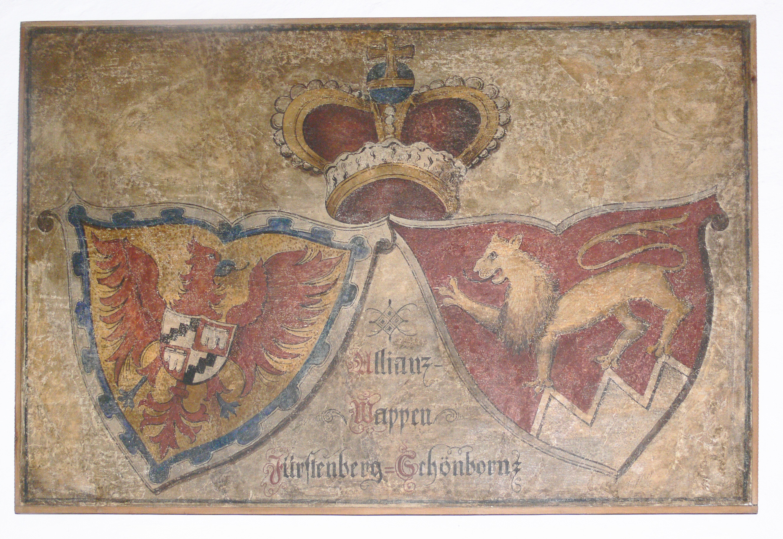 Burg Wildenstein bei Leibertingen Allianzwappen Fürstenberg/Schönborn (Gemälde in der Burgschenke)